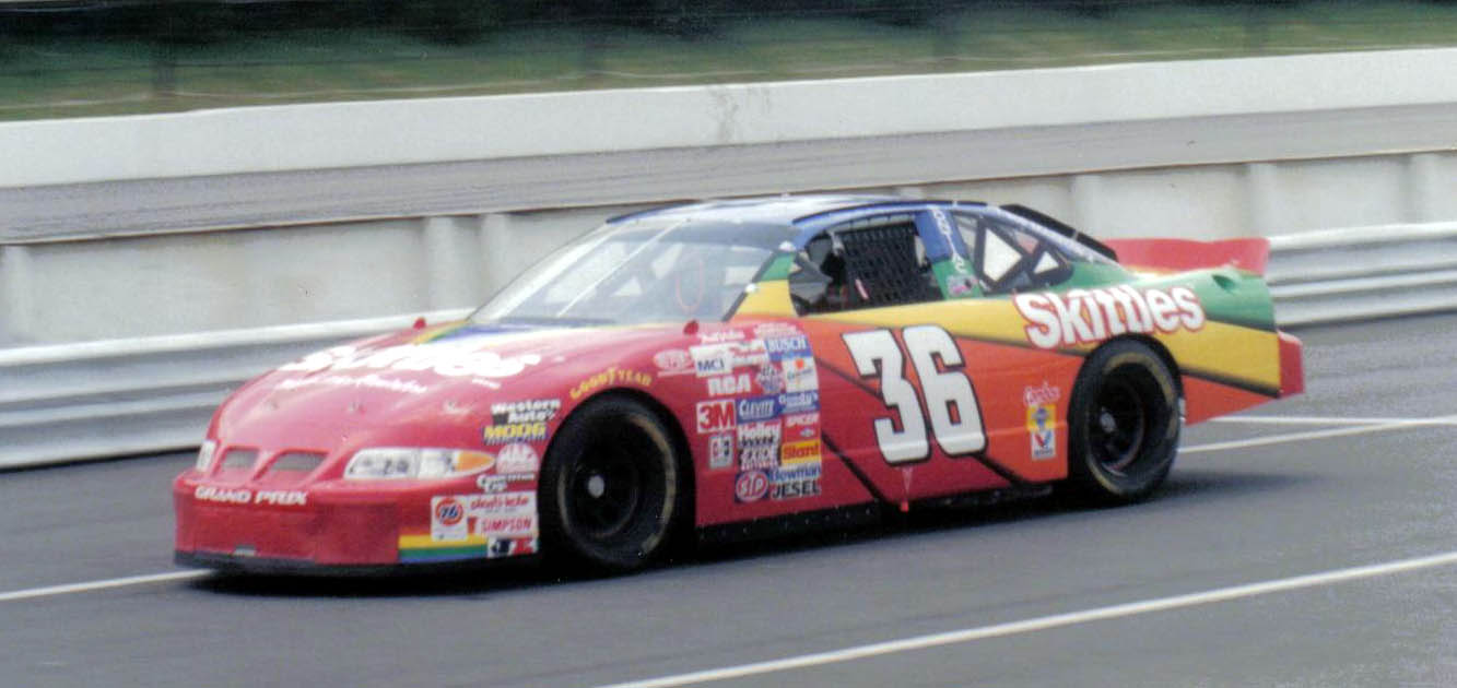 NASCAR driver Derrike Cope at Pocono in 1997.